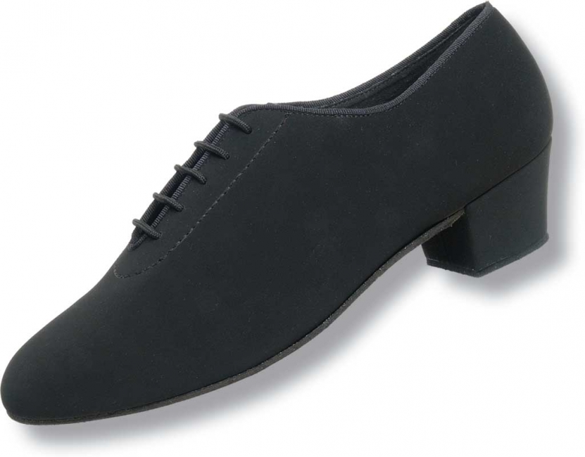 ArtNr. 091-024-040-A Mod. 091 Latein-Herrenschuh Weite F Cuban Absatz 4 cm schwarz Nubuk Synth.